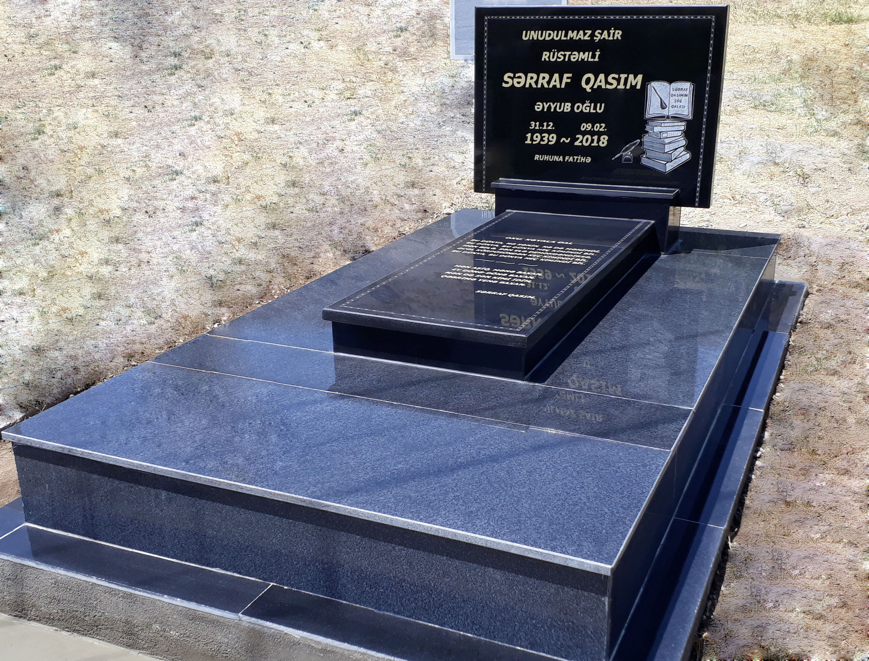 Şair Sərraf Qasımın məzarı